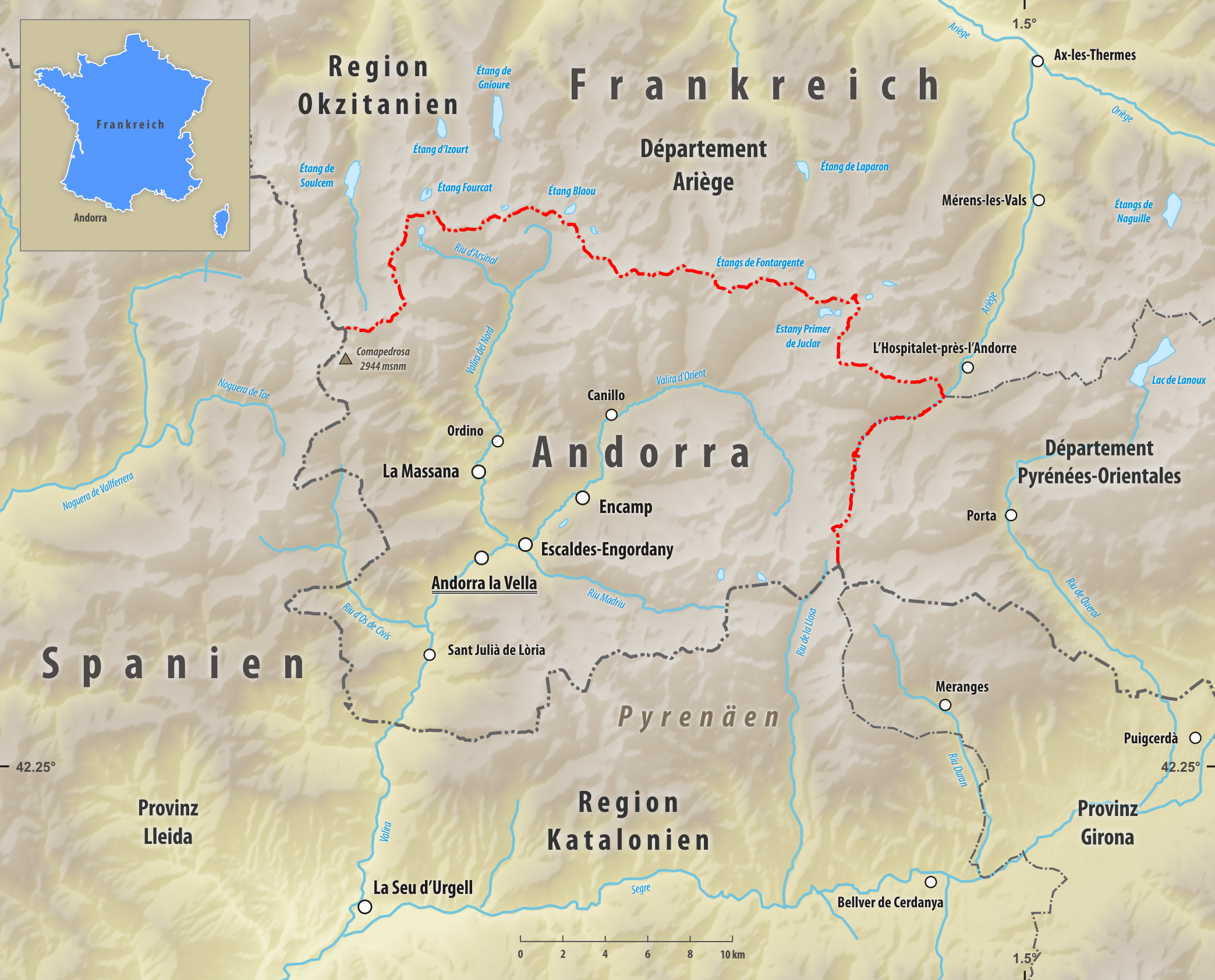 Reliefkarte des Grenzverlaufes zwischen Frankreich und Andorra Topographischer Hintergrund: NASA Shuttle Radar Topography Mission (public domain). SRTM3 v.2.